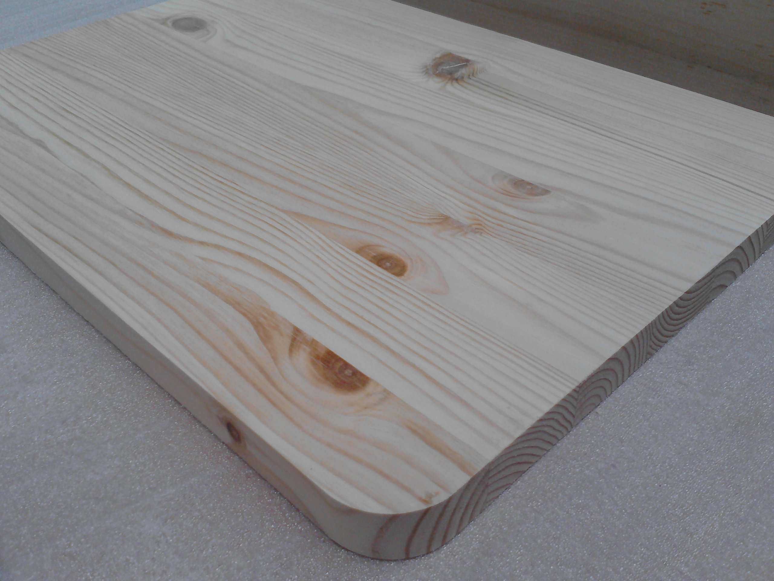 Klejonka sosnowa